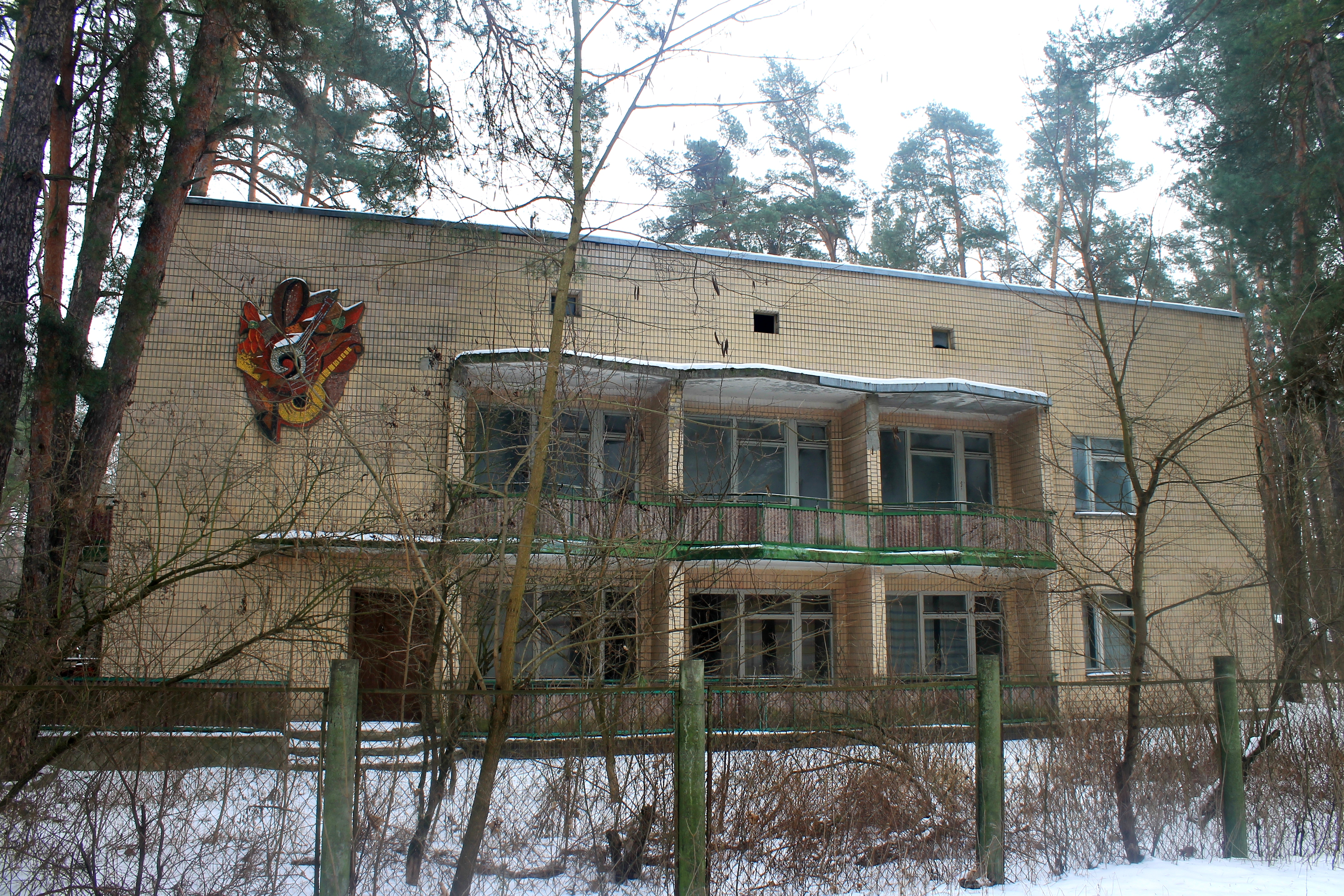 Будинок творчості композиторів Ворзель, 2014